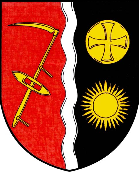 Znak obce Radvanec